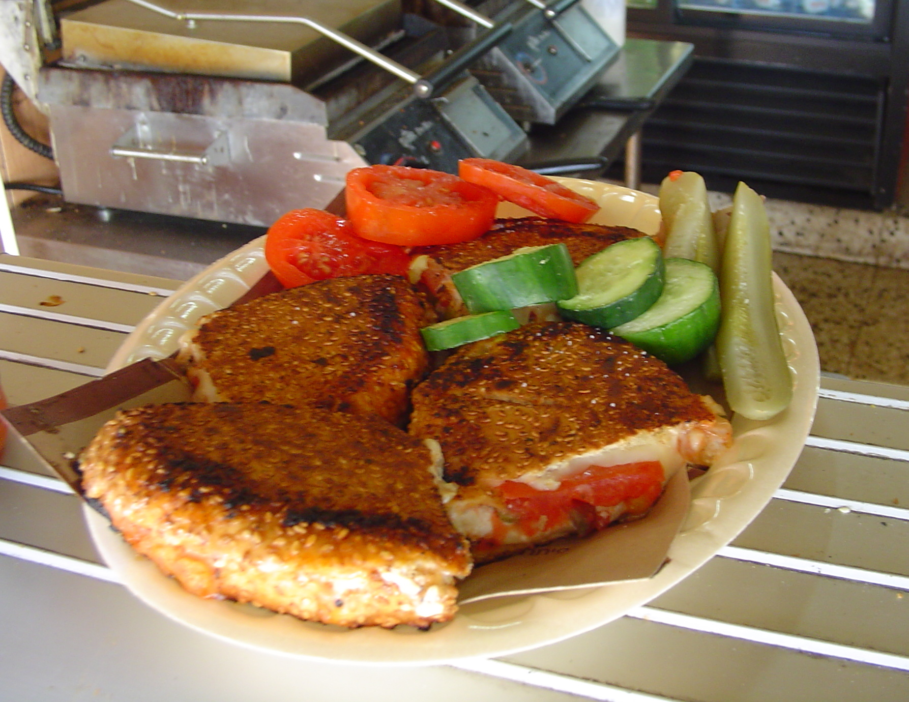 צולם במאפיית אבולעפיה בתל אביב